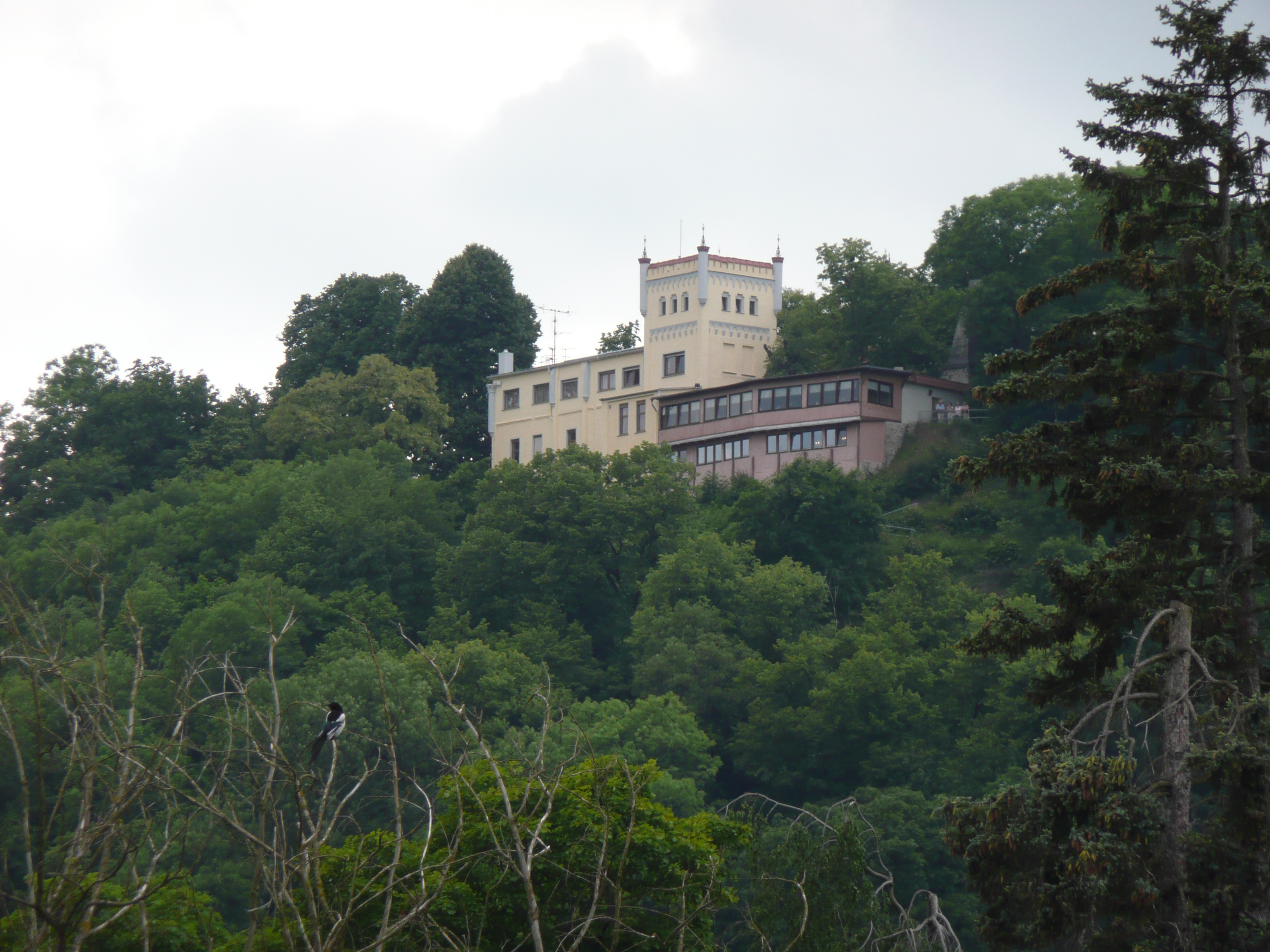 Bad Kösen, Berghotel Wilhelmsburg